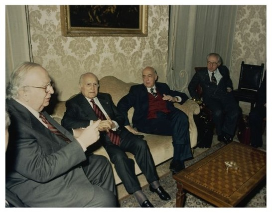 Palazzo Madama: il Presidente della Camera dei Deputati Giorgio Napolitano incontra il Presidente della Repubblica Oscar Luigi Scalfaro e il Presidente del Senato Giovanni Spadolini nella cerimonia di presentazione dei due volumi: "Uomini liberi" e "Archivio di Ezio Franceschini sulla Resistenza"